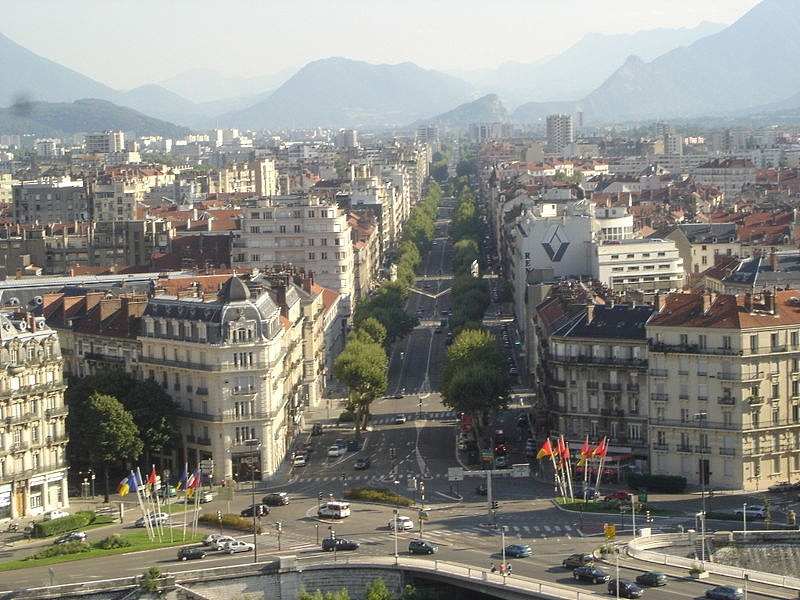 cours Jean jaurès à Grenoble (longueur = 7700 m.)